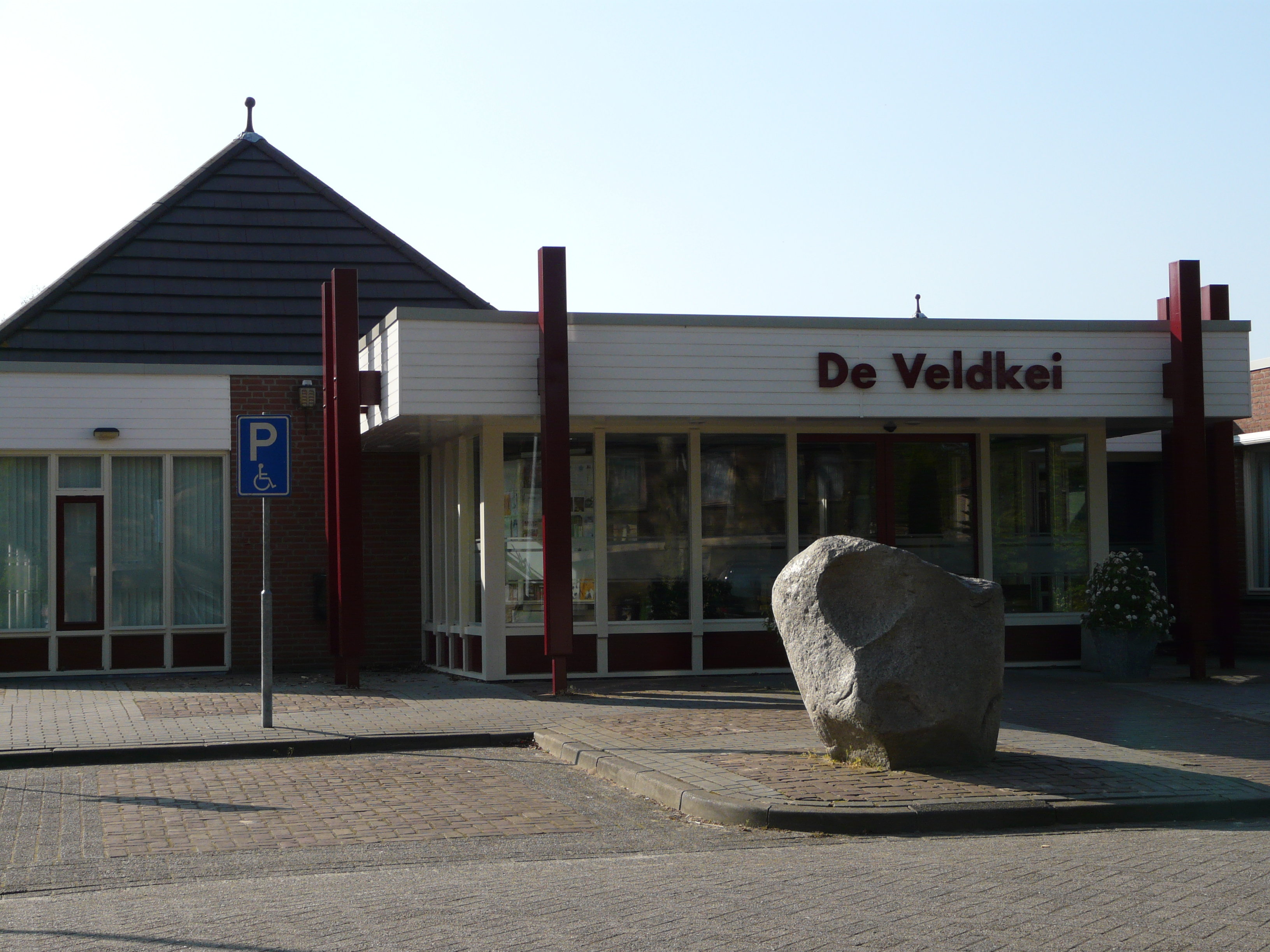 Dorpscentrum de Veldkei in Havelte